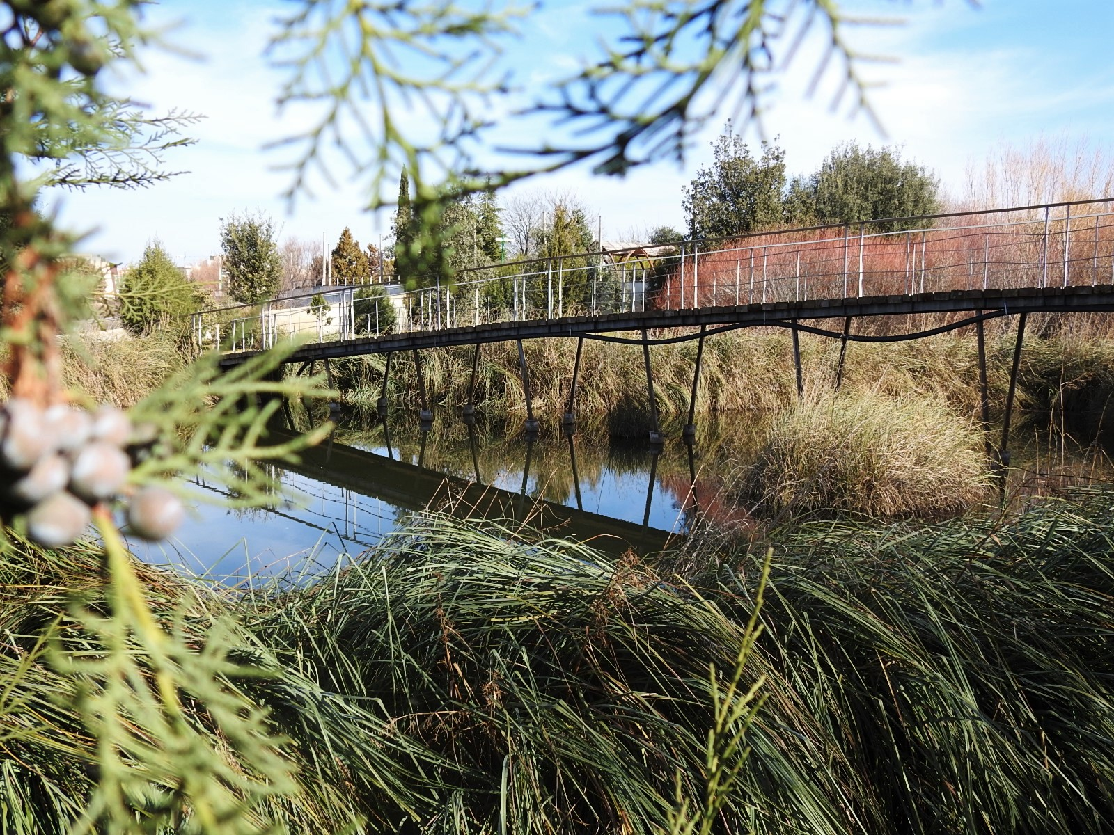 Puente sobre la recreación de las Lagunas de Ruidera, en el Jardín Botánico de Castilla-La Mancha.